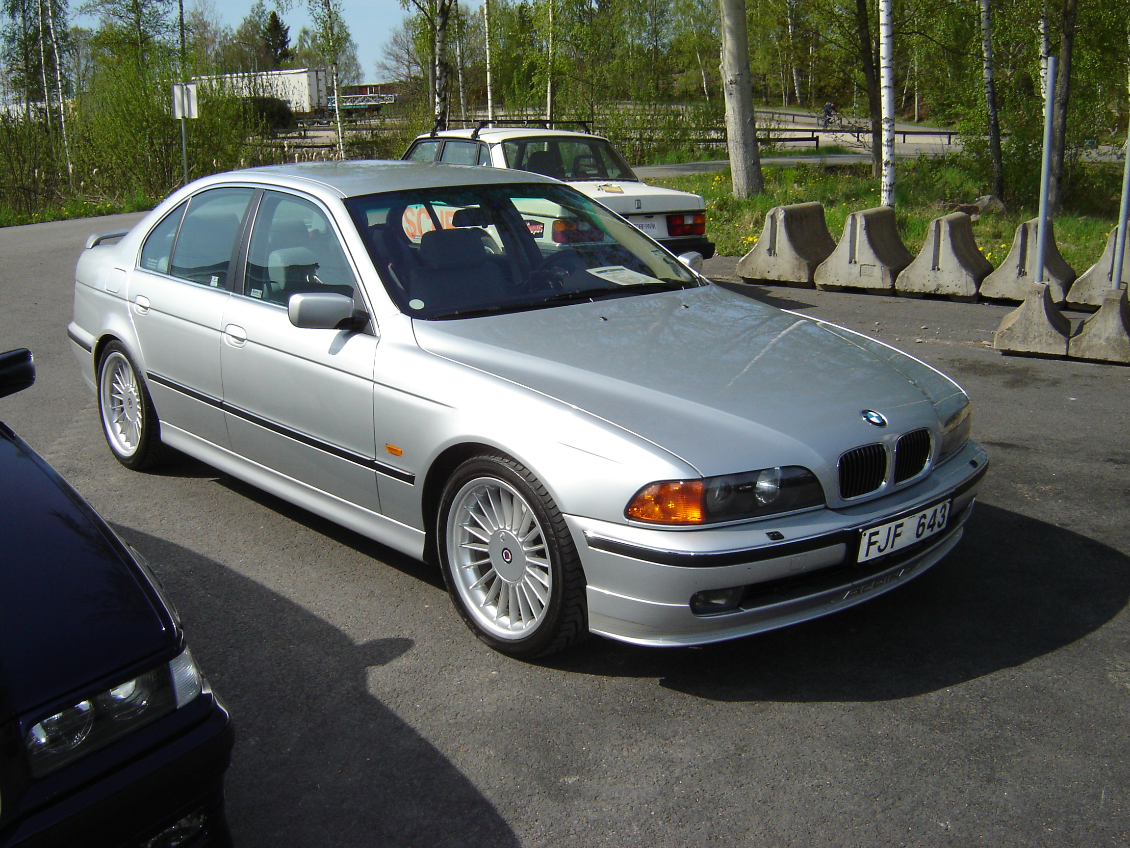 From BMW Spring Break 2007,Mantorp,Sweden